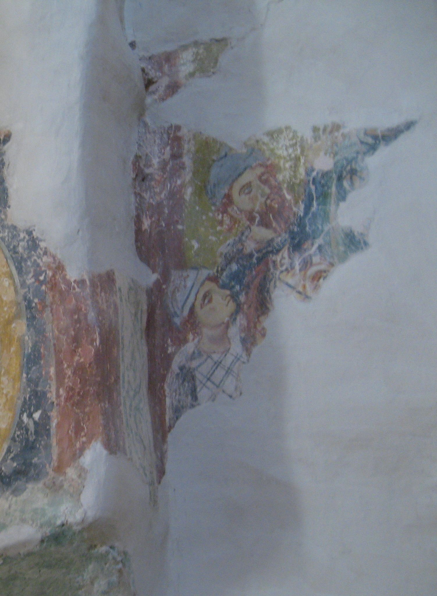 Фрагмент фрески "Рождество Христово" на южной стене собора Антониева монастыря. Волхвы.